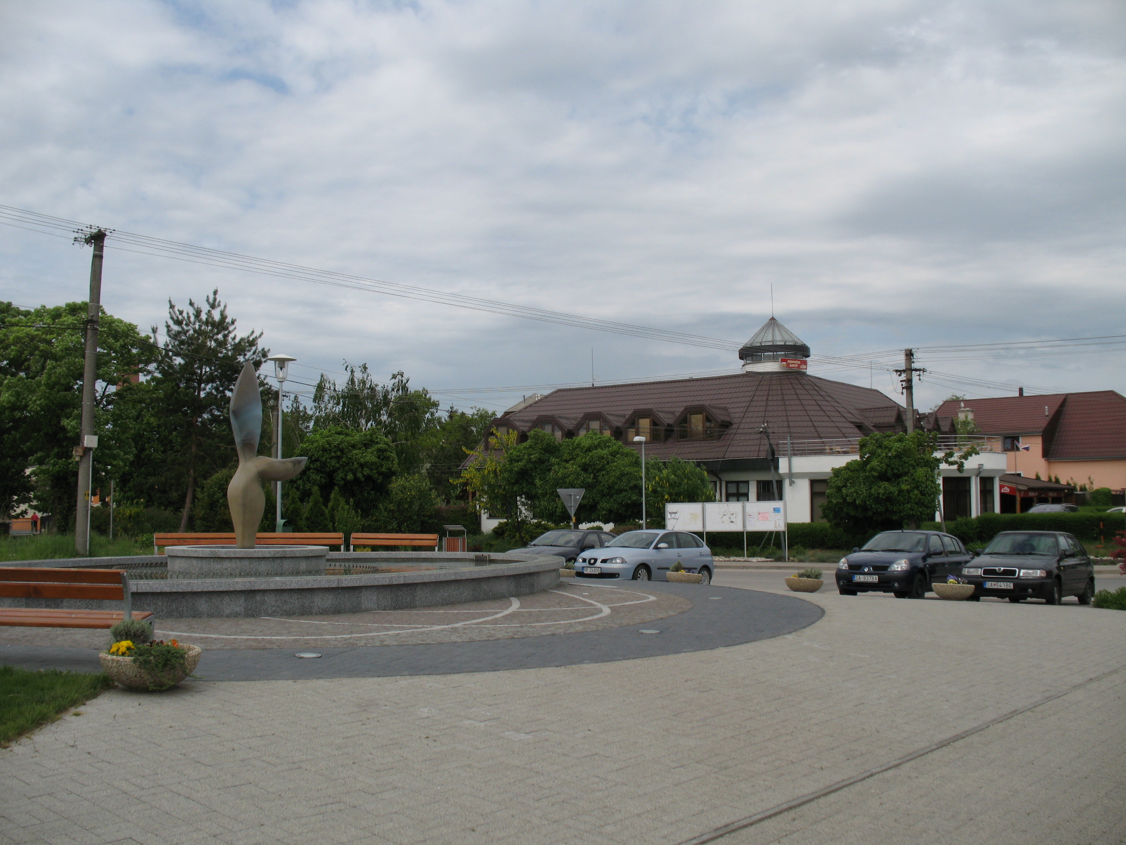 Mocsonok